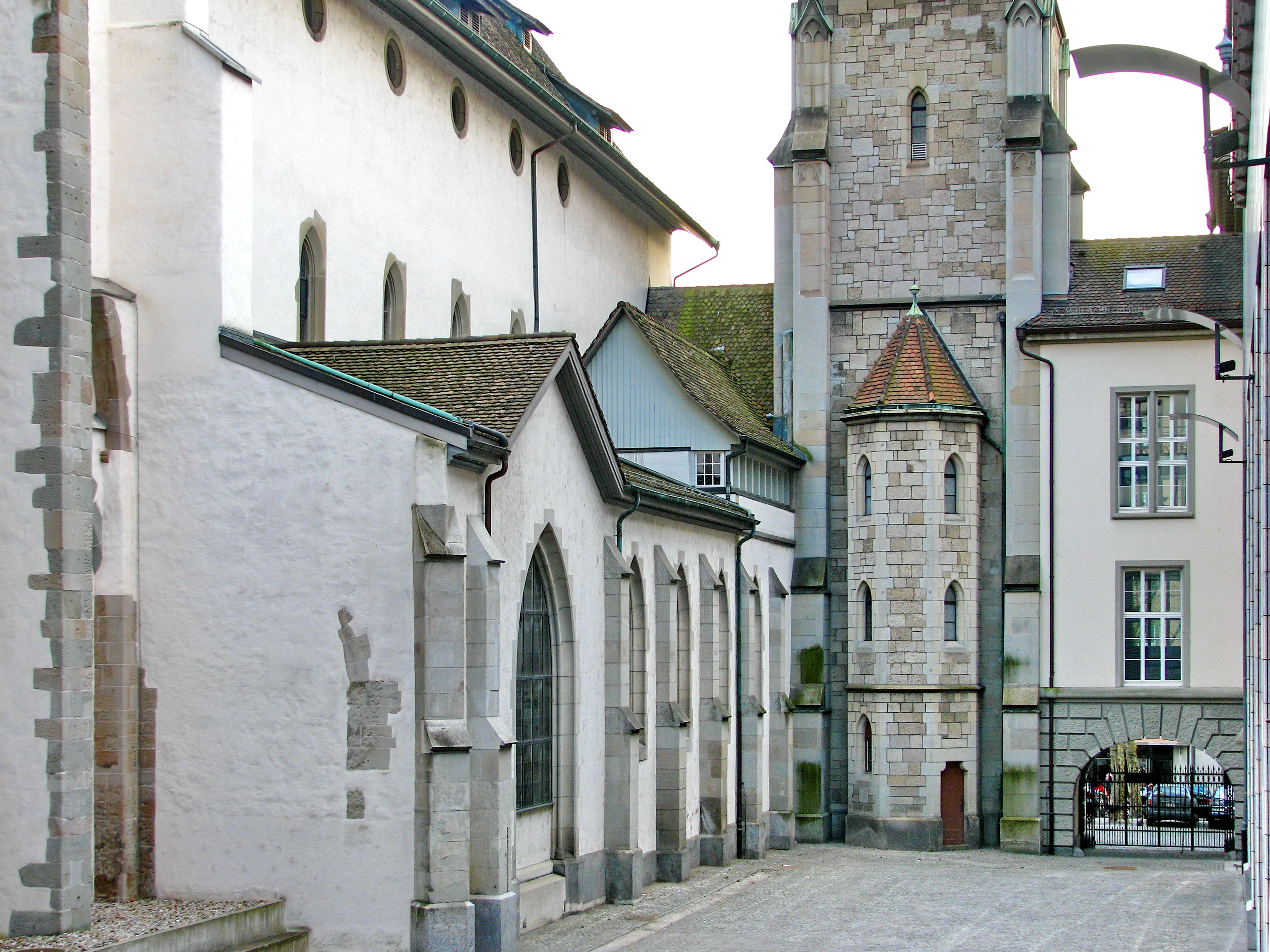 Prediger church in Zürich